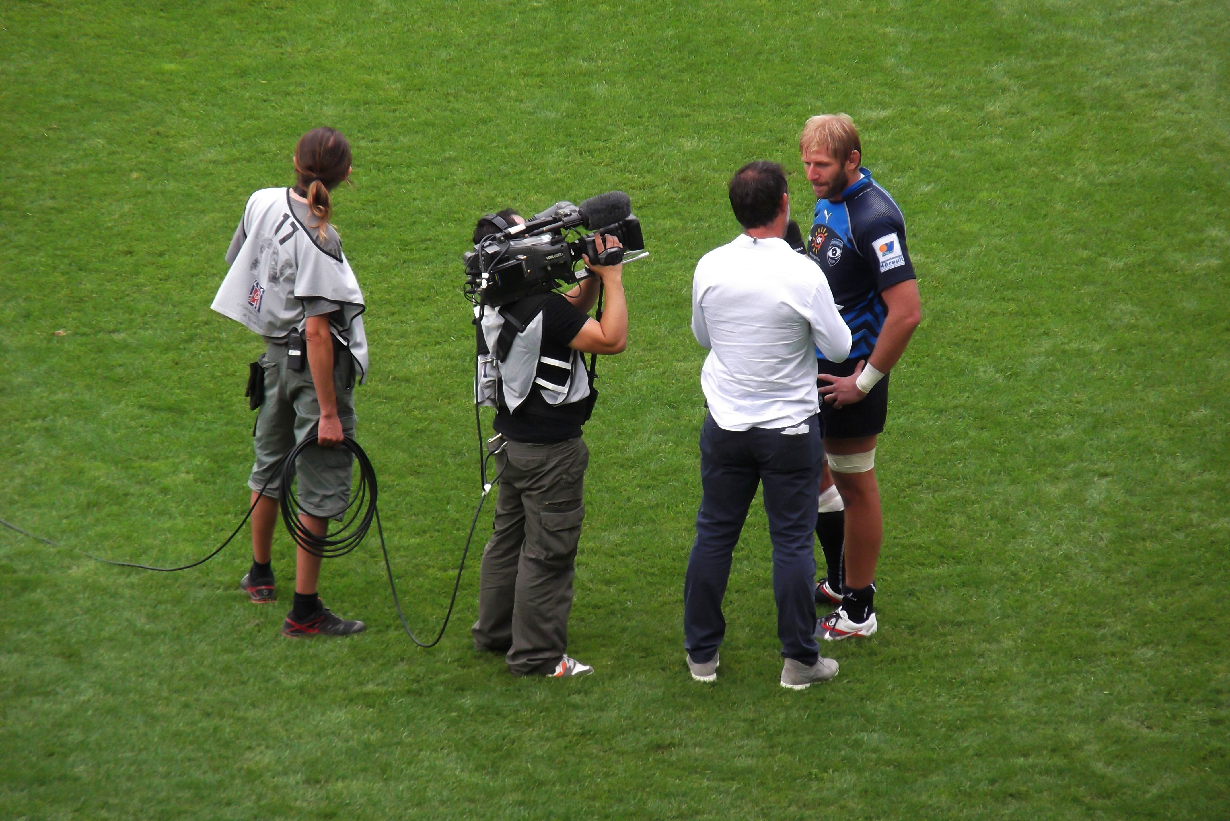 Thibaut Privat : interview fin de match.